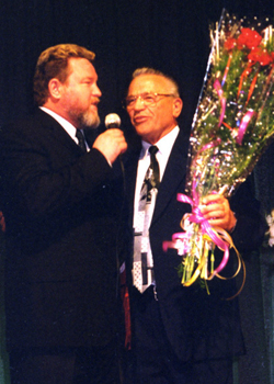 М. С. Евдокимов и В. Н. БаваринГубернатор и мэр. Погибли в двух автокатастрофах